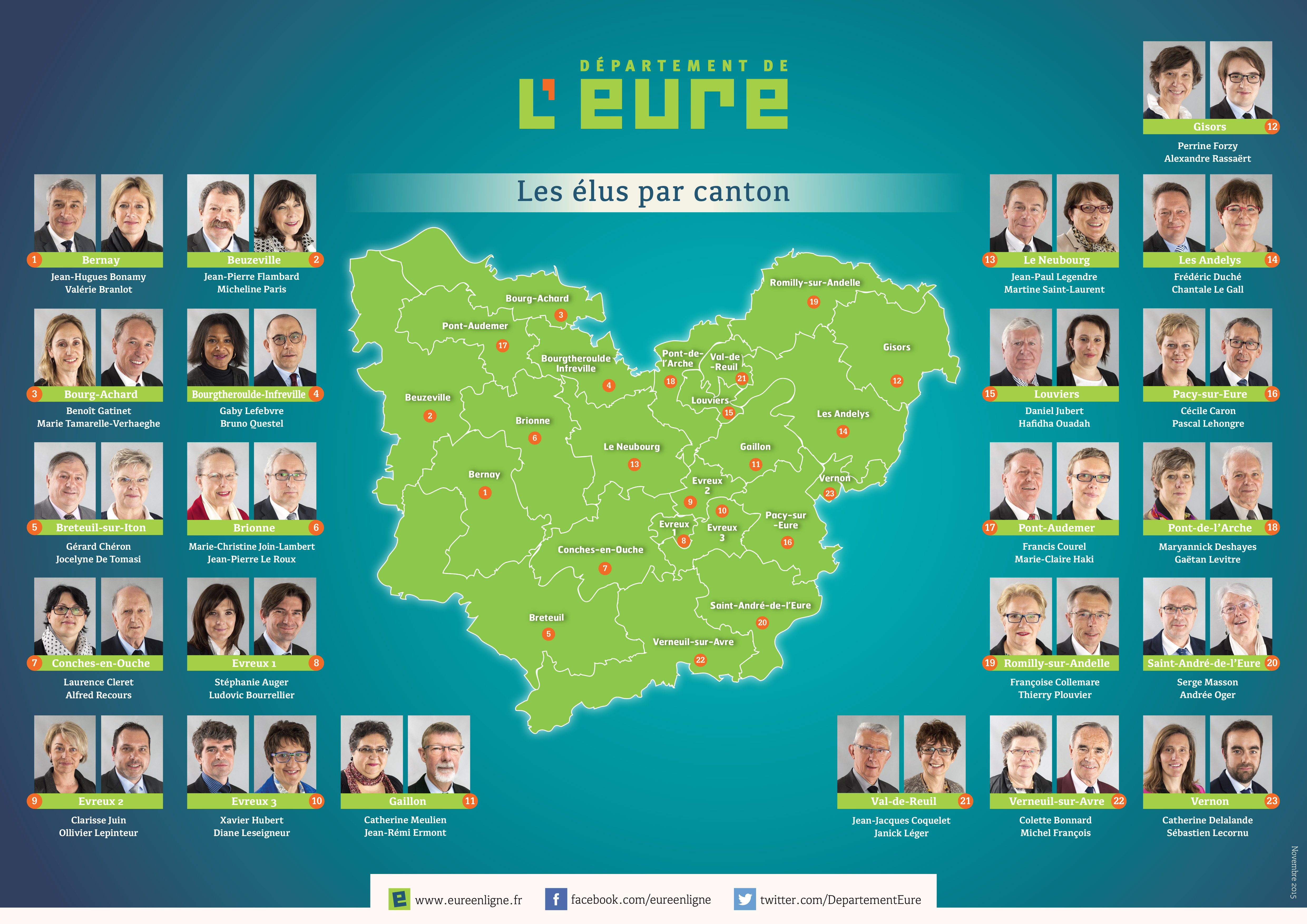 carte des conseillers départementaux de l'Eure par canton